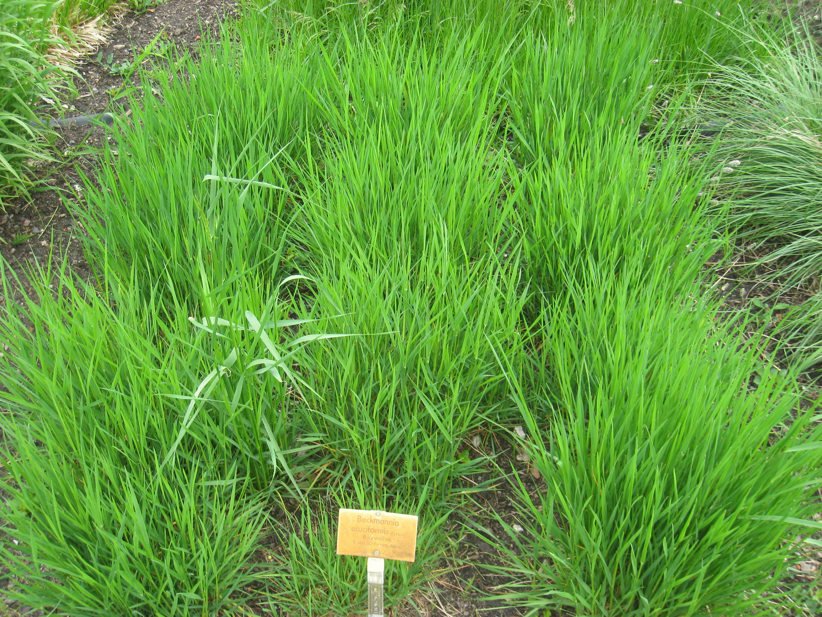 Beckmannia eruciformis specimen in the Botanischer Garten, Berlin-Dahlem (Berlin Botanical Garden), Berlin, Germany.